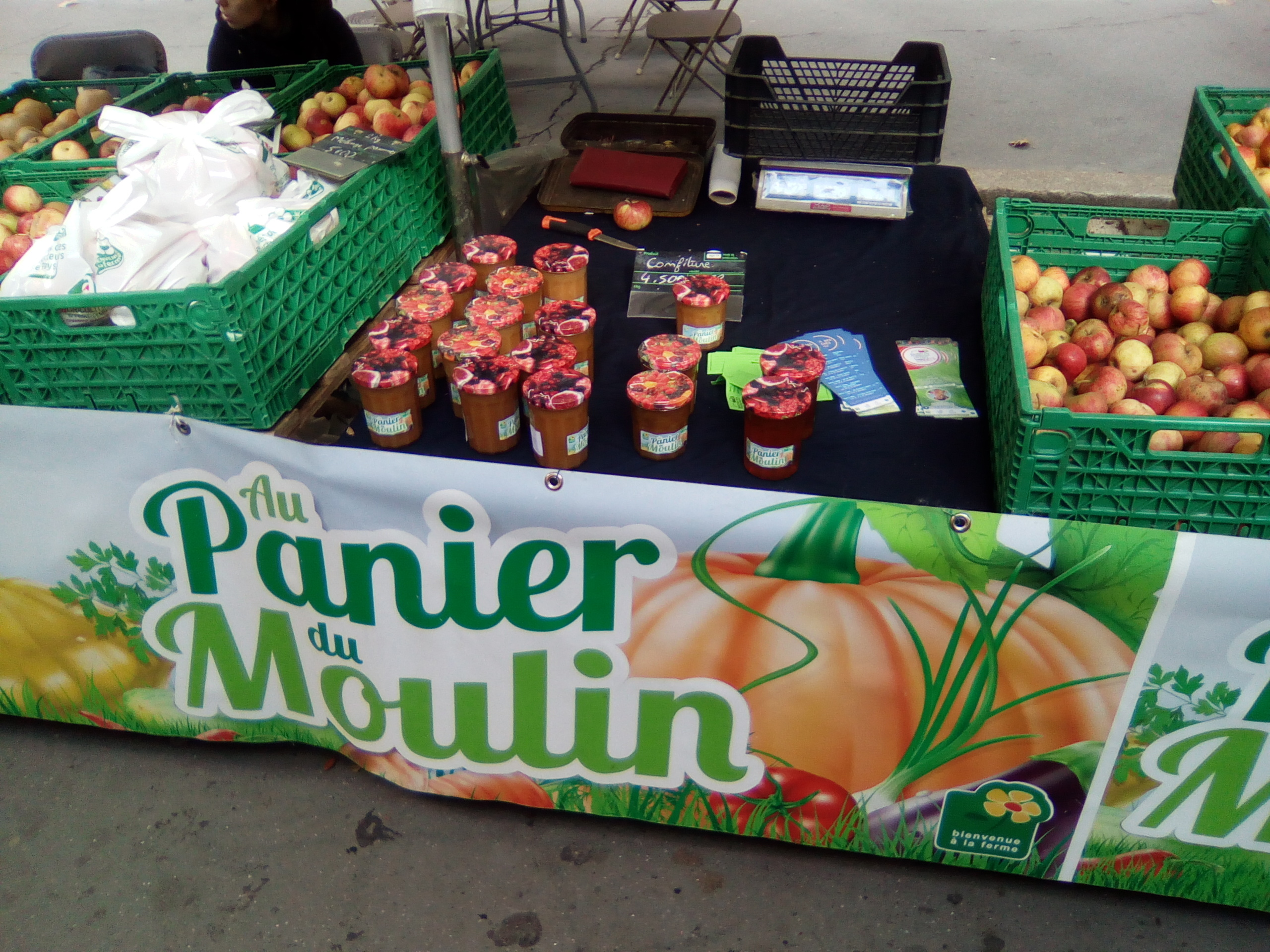 Stand au marché des producteurs de pays, boulevard de Reuilly à Paris.